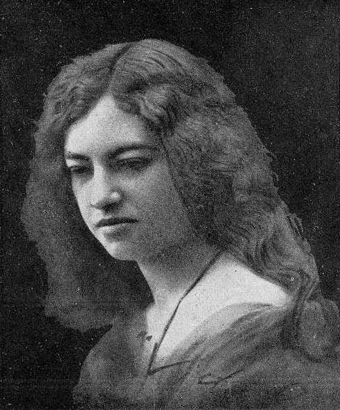 Herminia Fariña Cobián, retrato en Vida Gallega, 1927